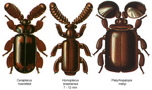 Paussidae spec.